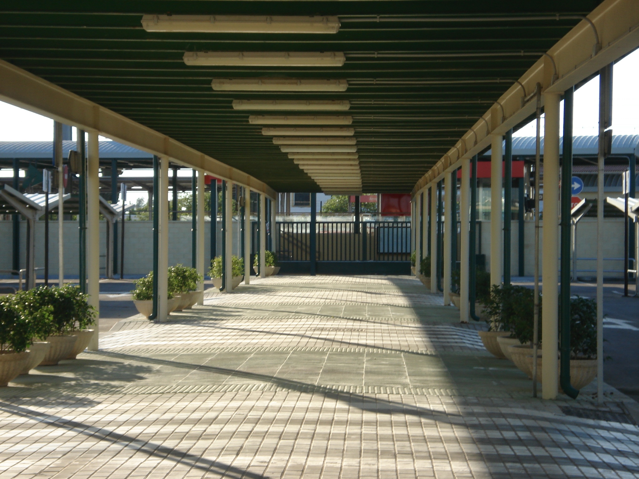 Train stop in Aeropuerto de Jerez de la Frontera